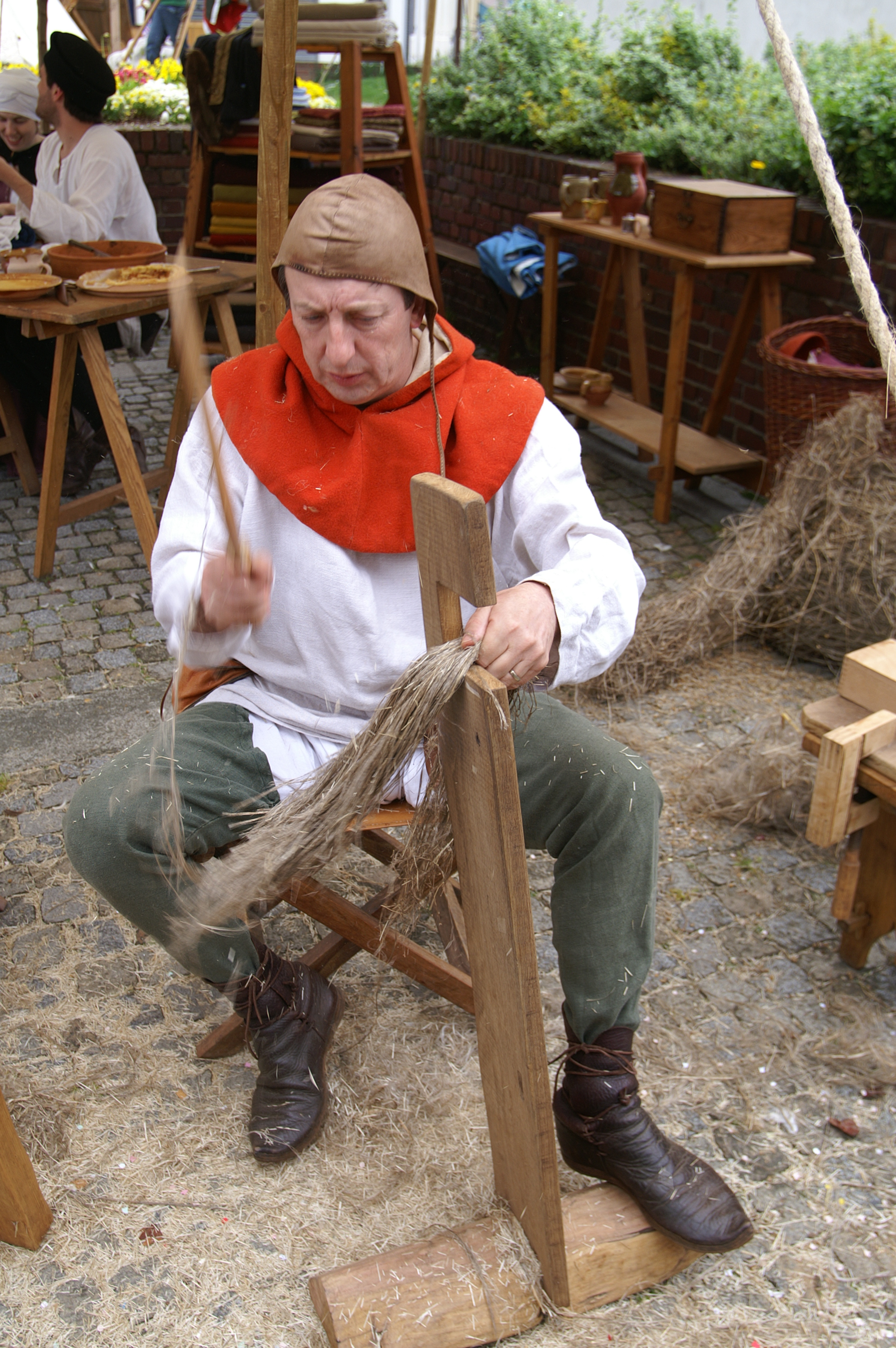 Battage du lin par les Compagnons duellistes d’Harfleur.